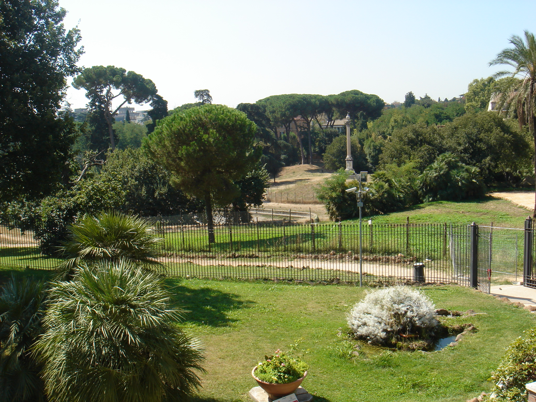 Roma, Villa Torlonia: giardino dalla Casina delle Civette. Sullo sfondo, la colonna onoraria di Carlo Torlonia.